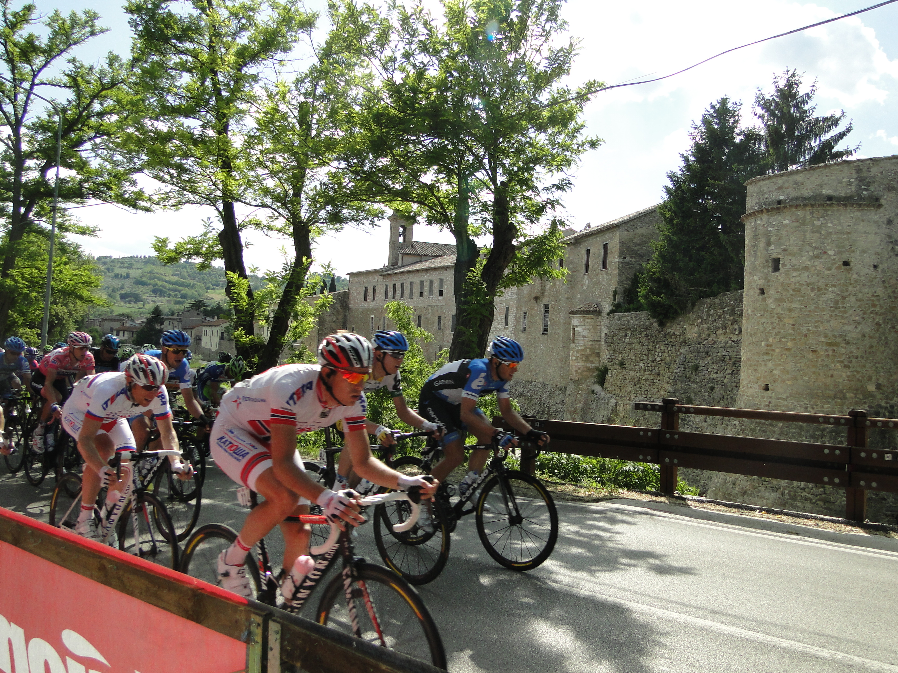 Oggi a Bevagna Explore